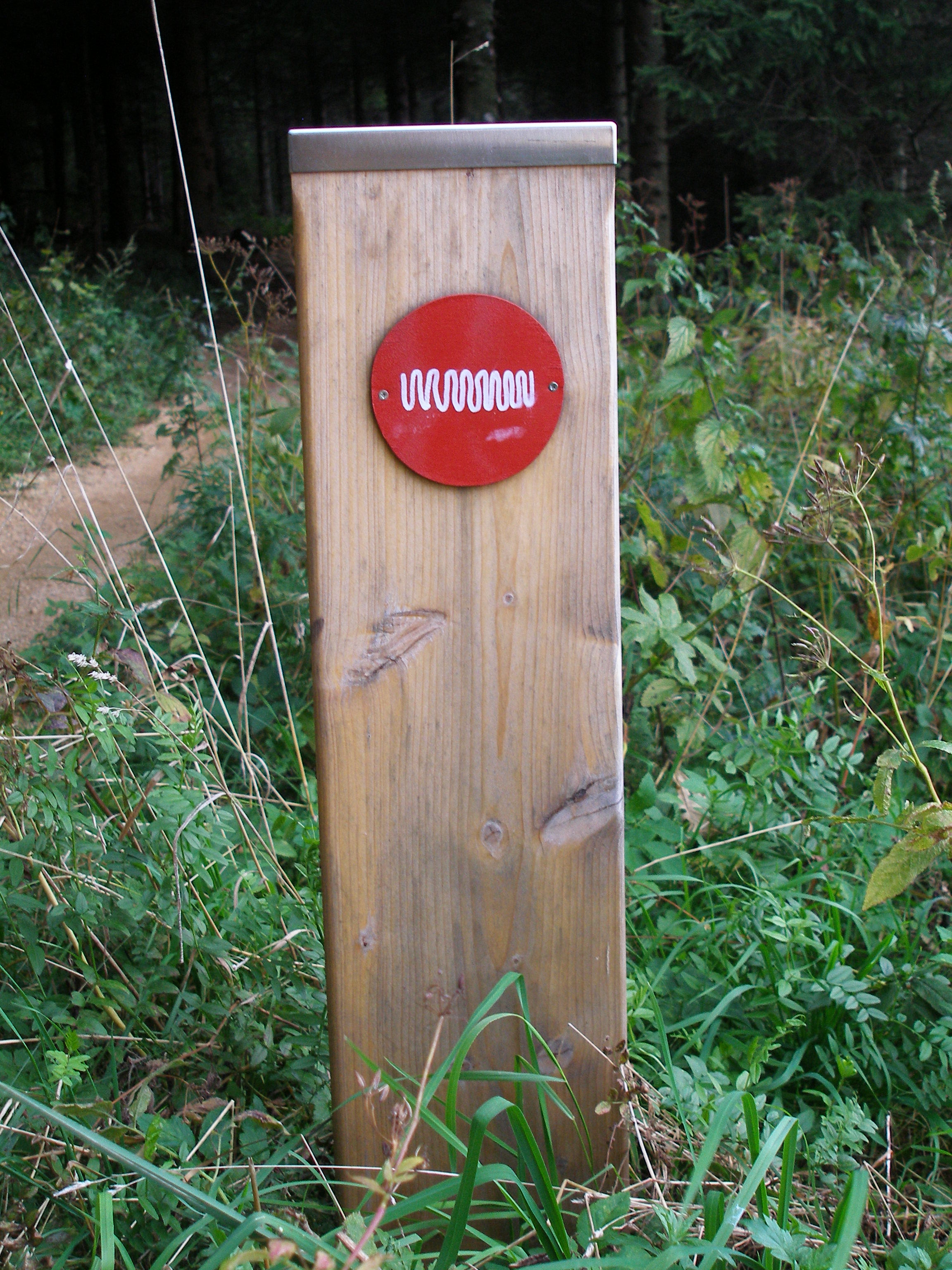 Singltrek pod Smrkem, upozornění na jízdu v protisměru.